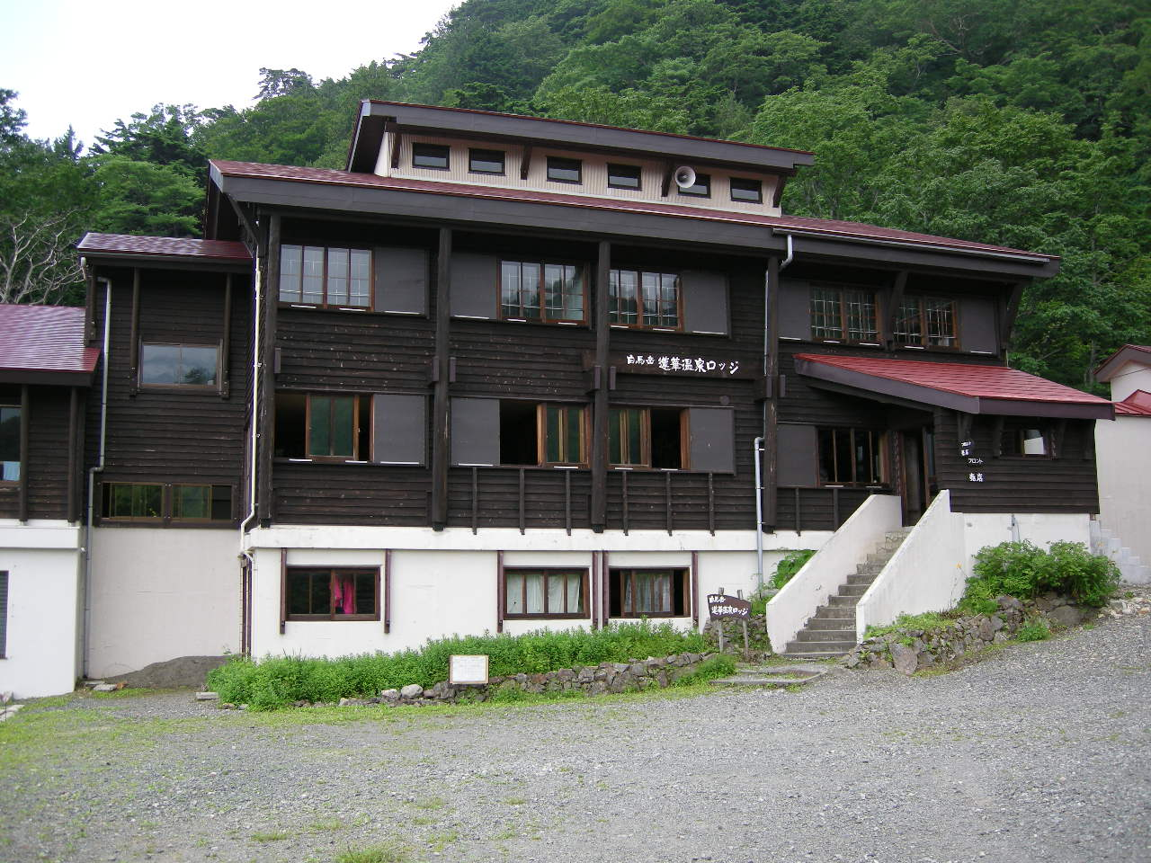 蓮華温泉ロッジ外観